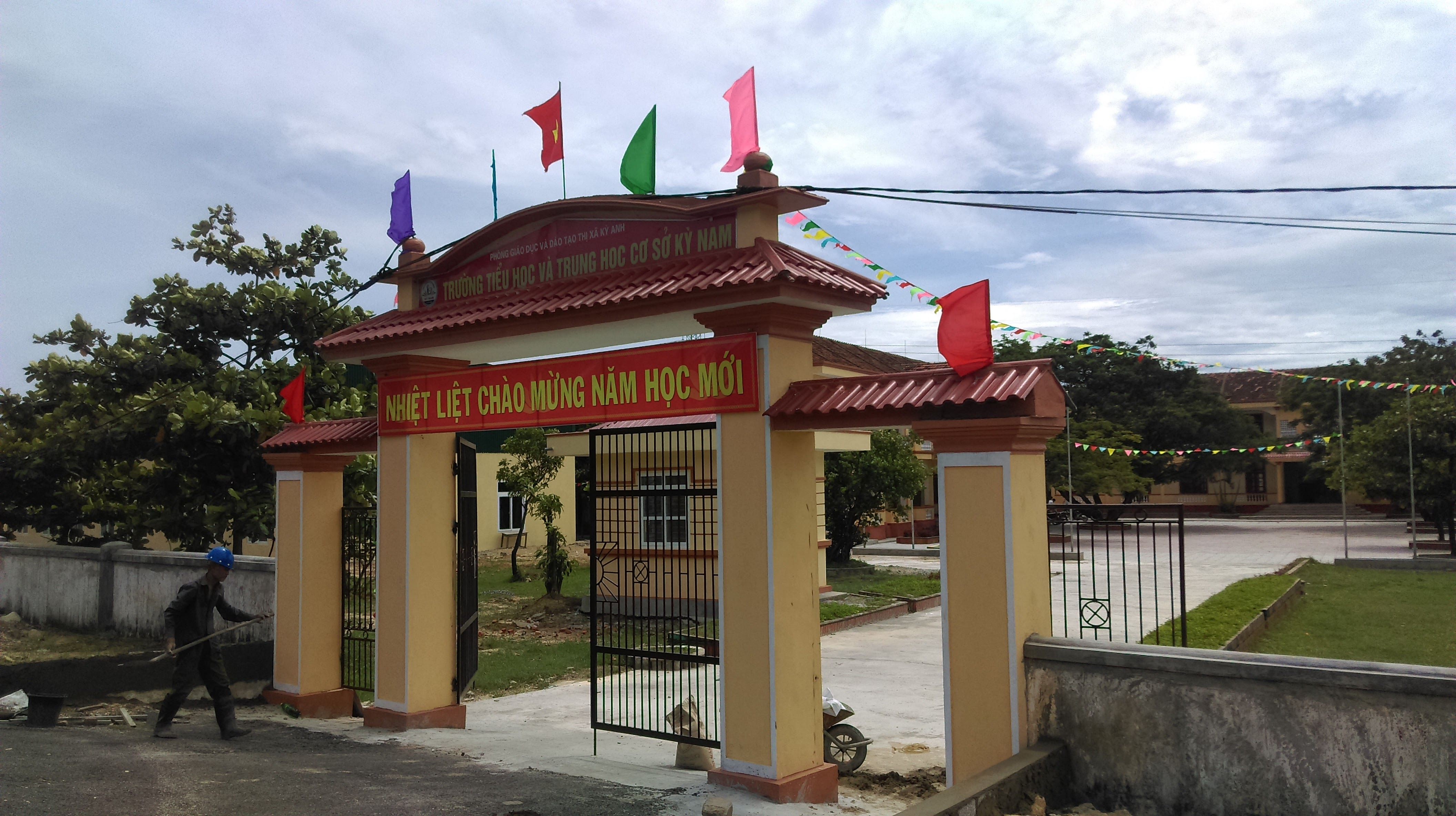 Trường Tiểu học và THCS Kỳ Nam, Kỳ Anh, Hà Tĩnh